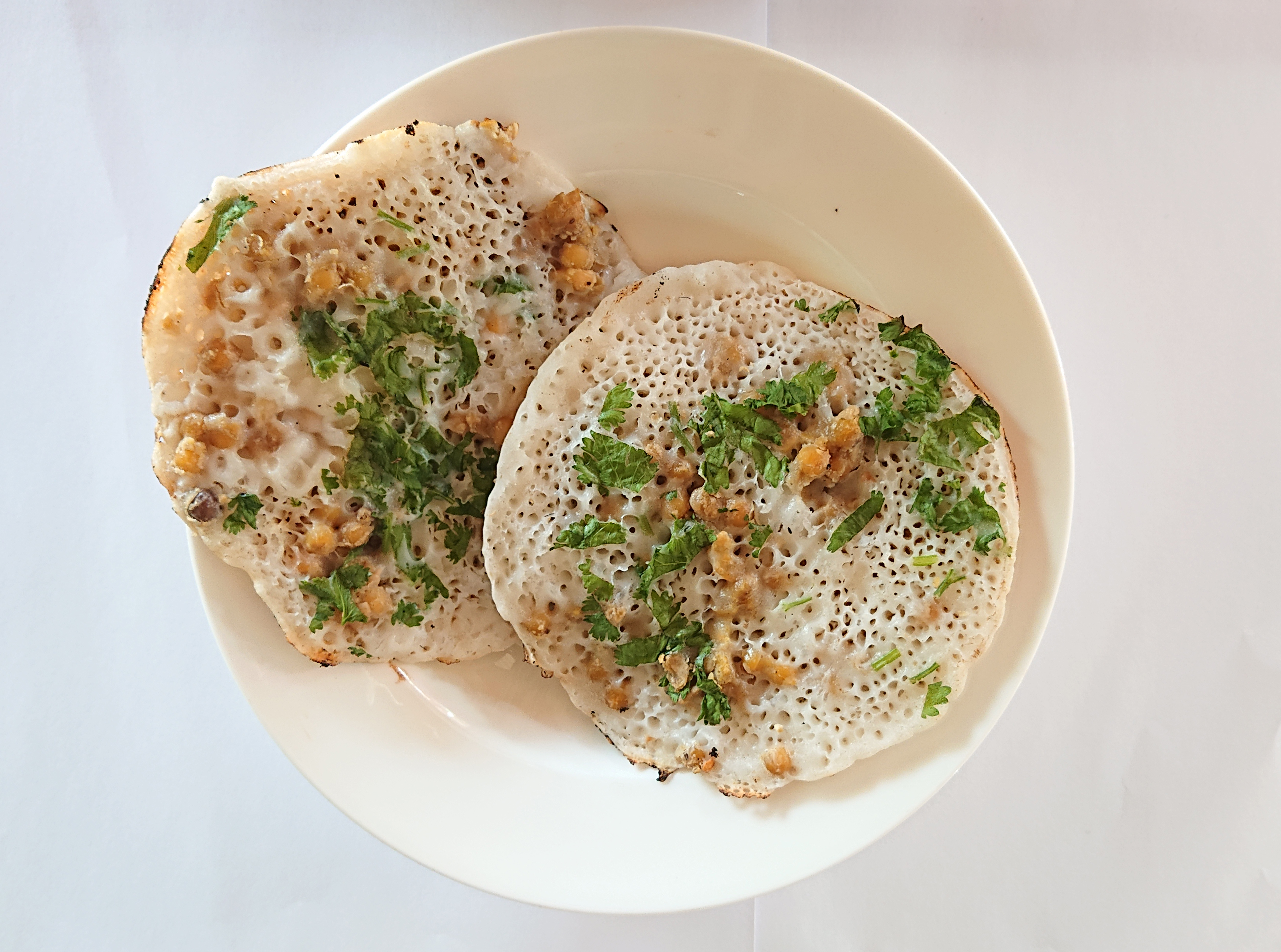 မြန်မာဘာသာ: မုန့်ပျားသလက်